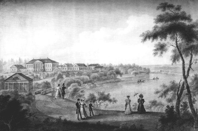 Аделоидино, усадьба Васильчиковых в Вяземском уезде